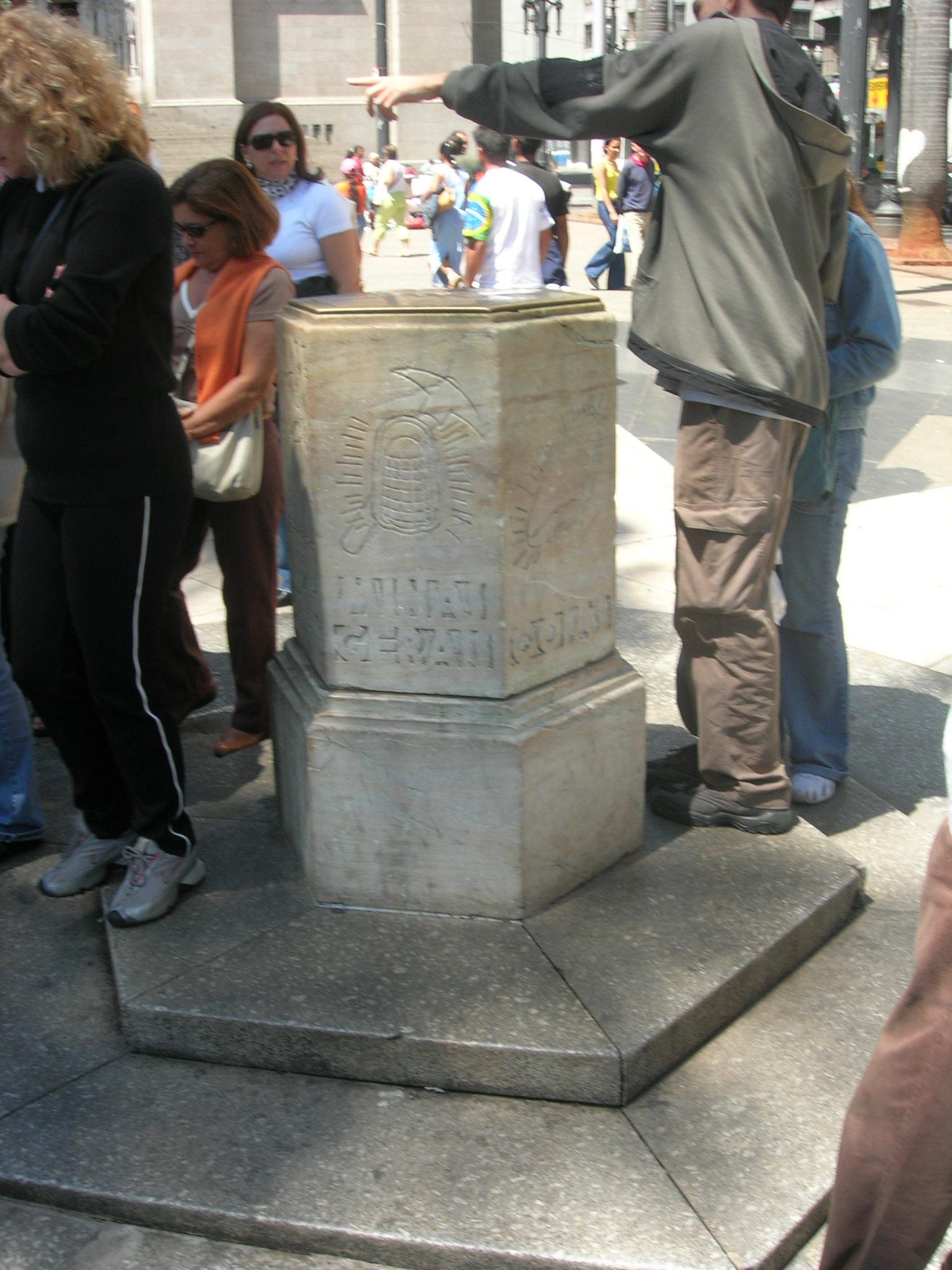 Marco Zero da cidade de São Paulo, foto tirada por mim.